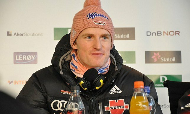 Severin Freund na konferencji prasowej po konkursie drużynowym mężczyzn na skoczni normalnej podczas Mistrzostw Świata w Narciarstwie Klasycznym 2011 w Oslo.